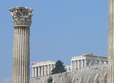 Colunma corintia del Templo de Zeus de Atenas y Acrópolis al fondo.